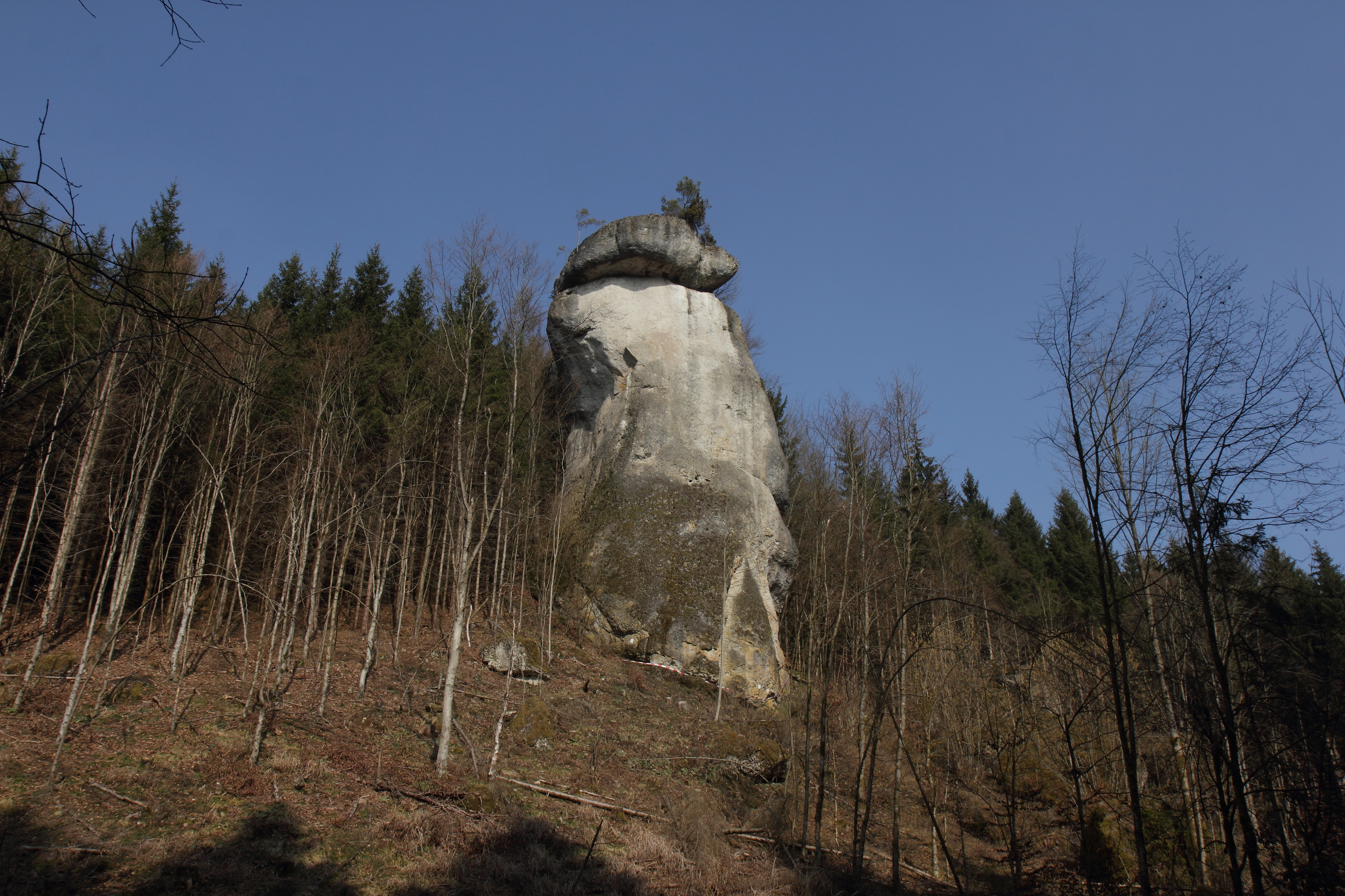 Naturdenkmal Rabenfels, sowie Geotop Nummer 371R037